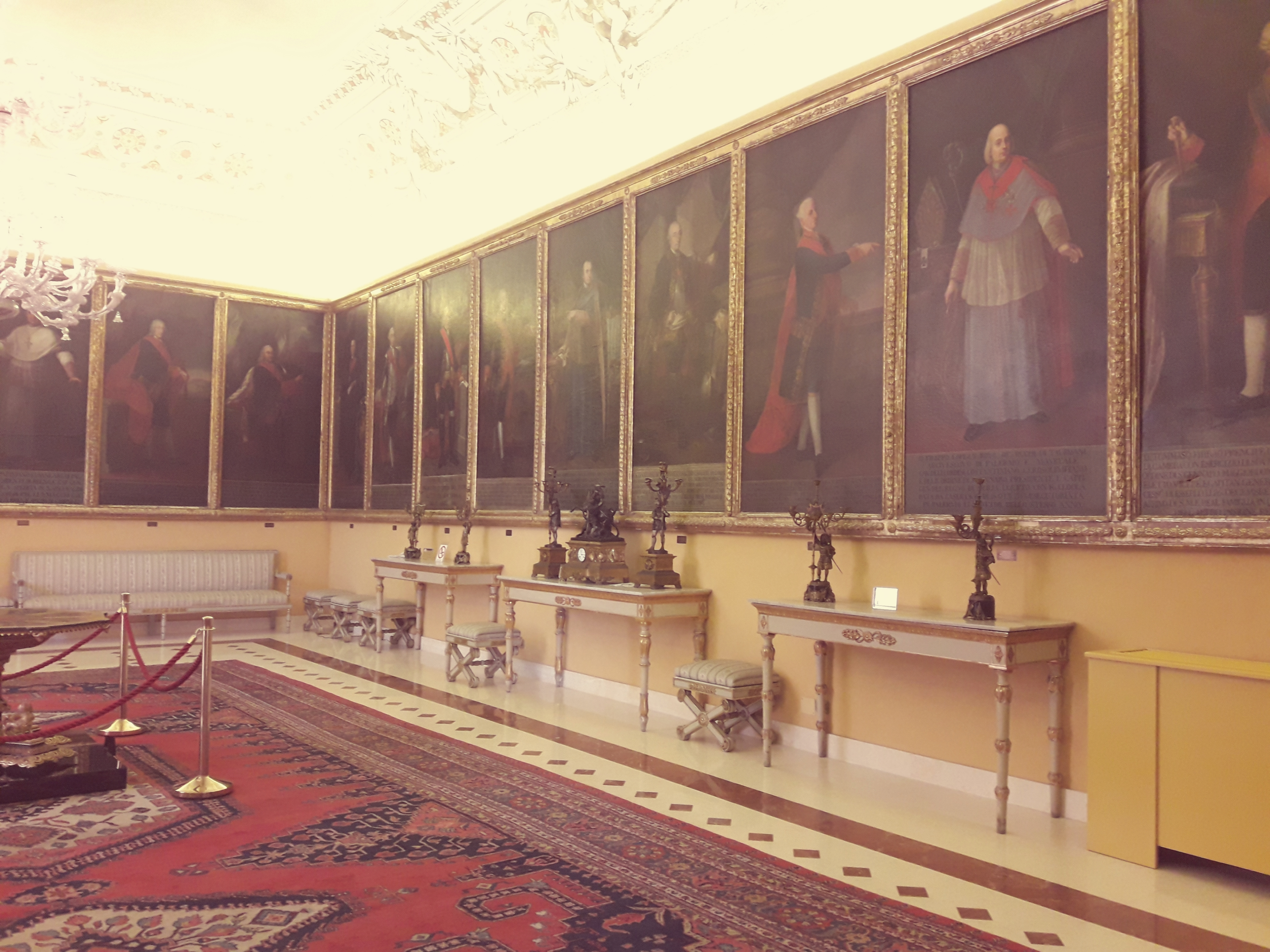 Sala dei Vicerè, Palazzo dei Normanni